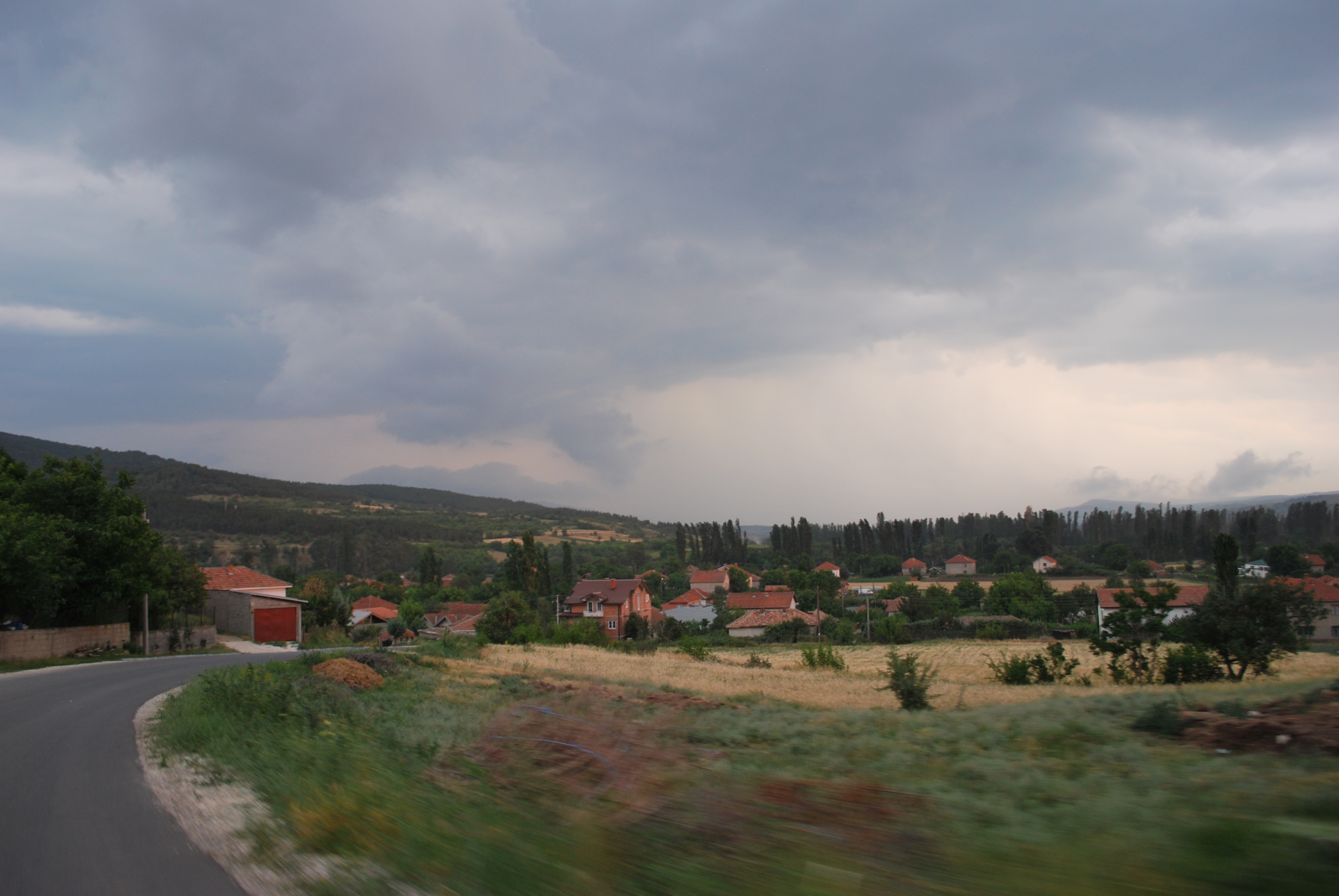 Pčinja village, Macedonia